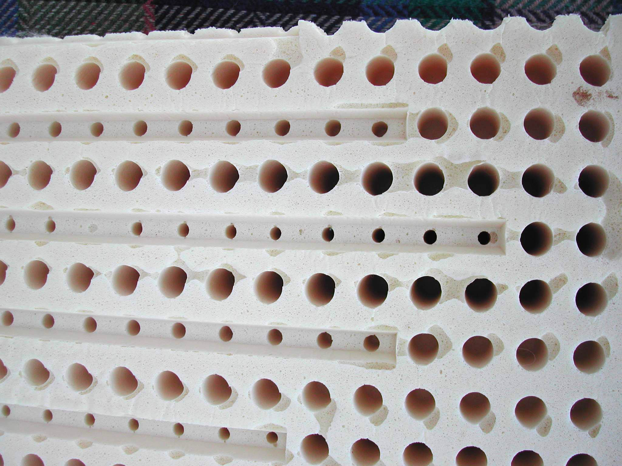 Vorführmuster eines Stiftlatexkerns